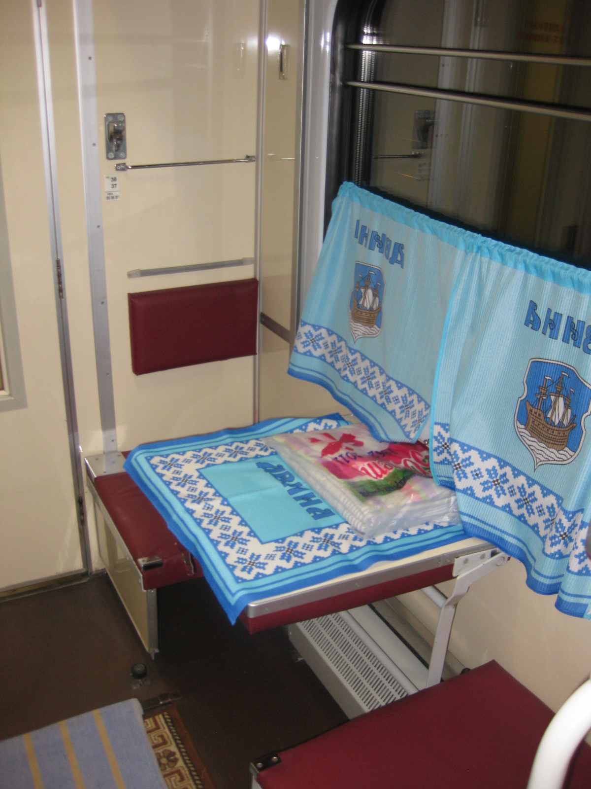 Фирменный поезд "Двина", Полоцк-Москва. Вид на нижнее боковое сиденье.